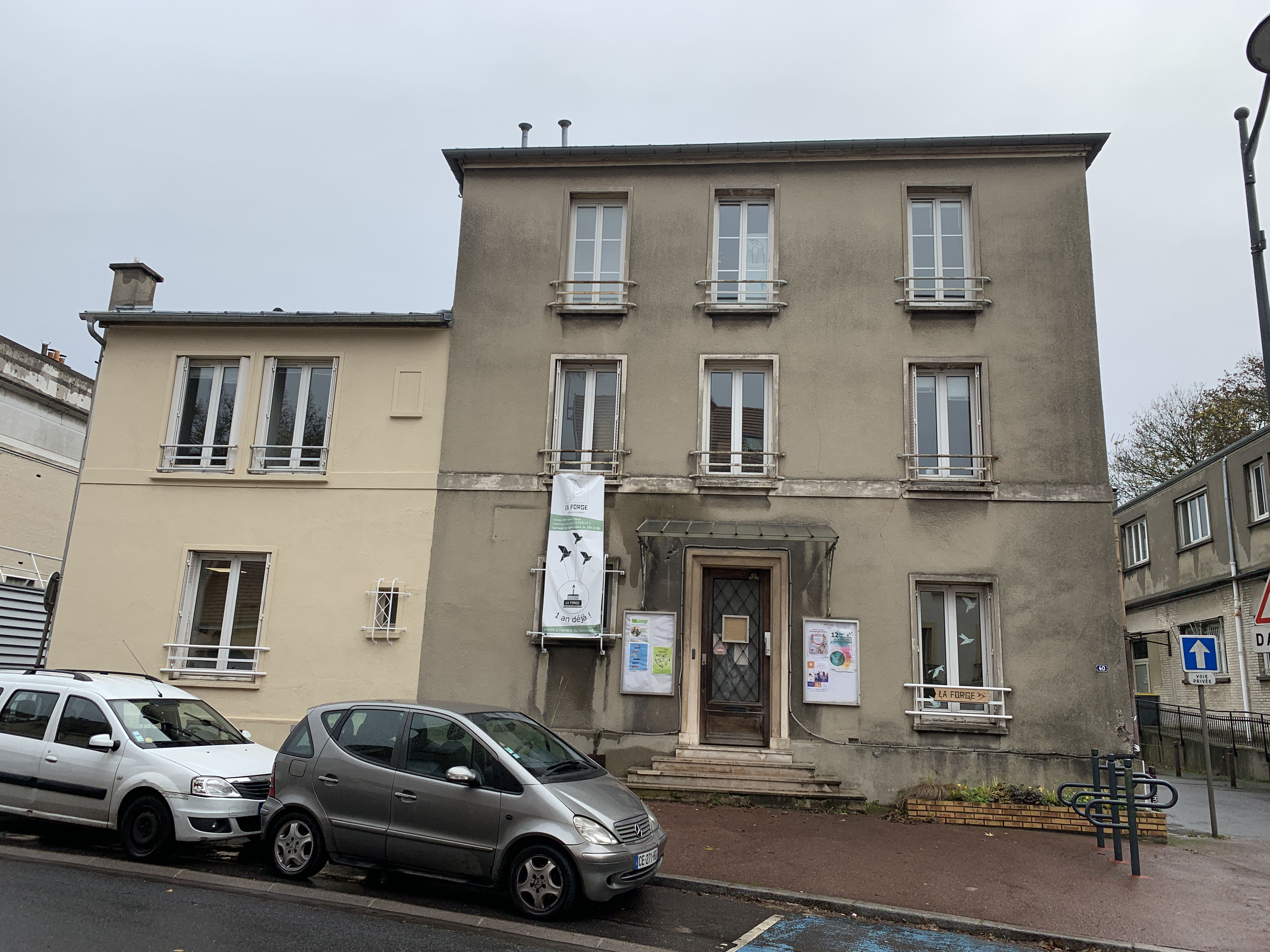 Bâtiment, 40 rue de Rosny, Fontenay-sous-Bois.